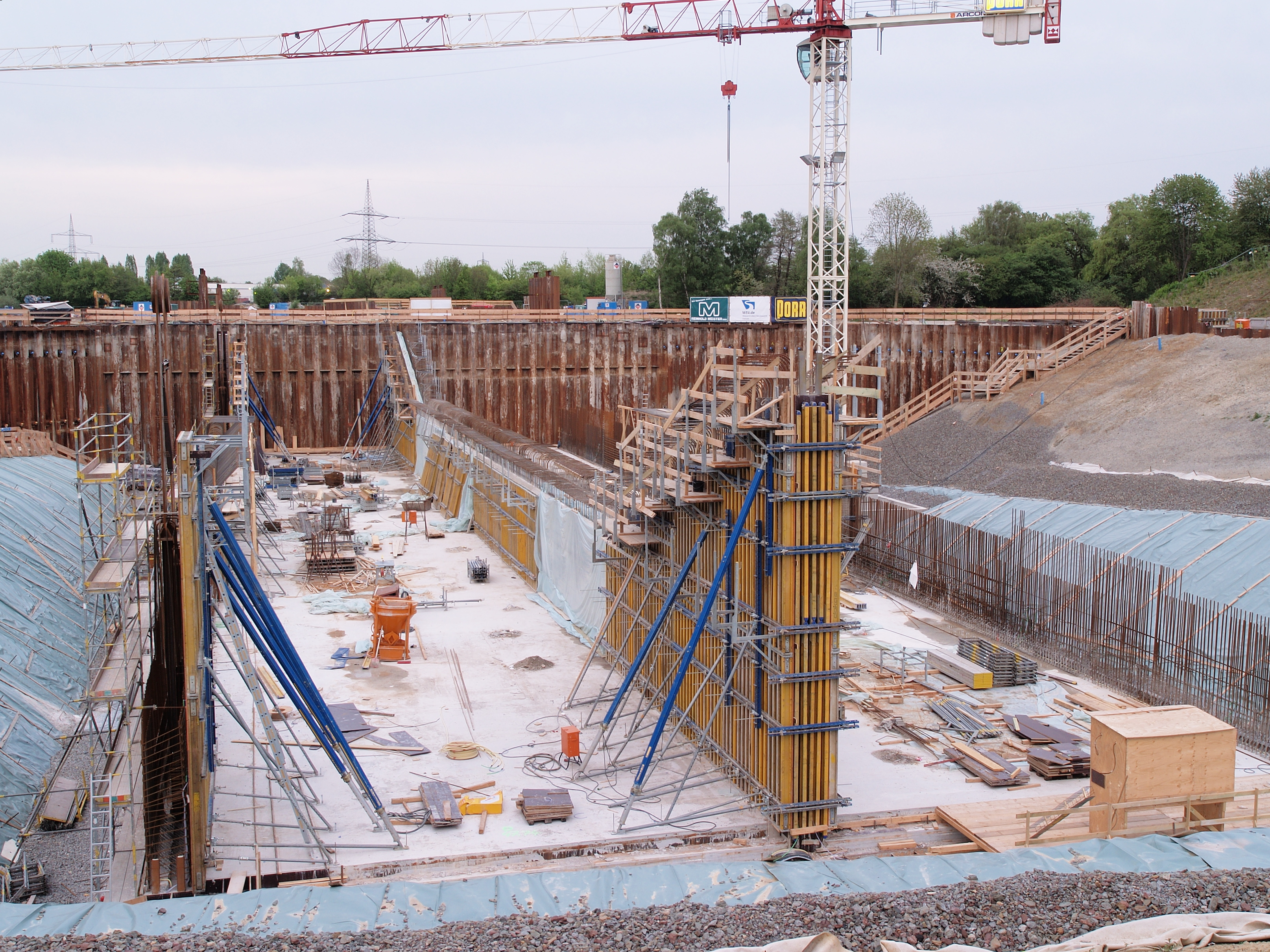 Neubau des Emscherdurchlasses unter dem Rhein-Herne-Kanal in Castrop Rauxel, Baugrube